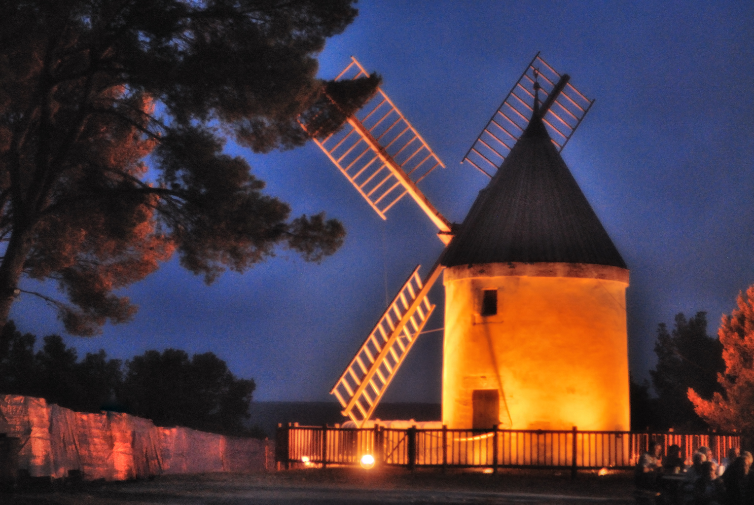 Moulin de Langlade